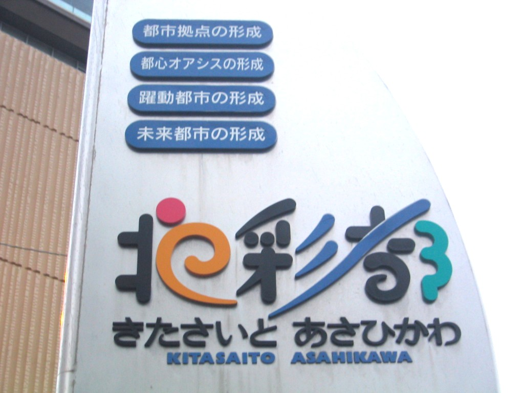 投稿者が撮影 撮影年月日：2010年5月8日 北海道旭川市における開発プロジェクト北彩都あさひかわを周知する看板